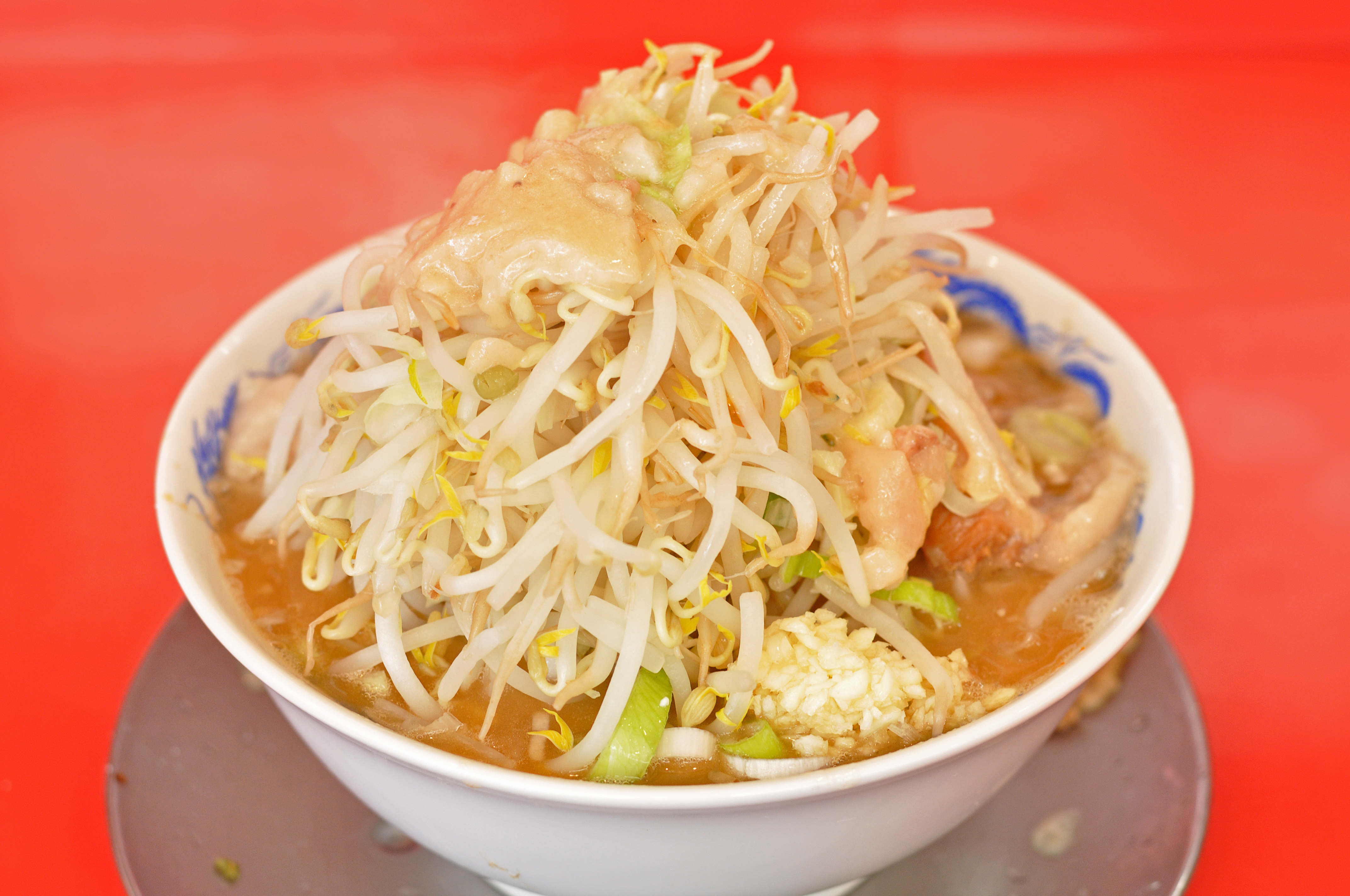 埼玉県春日部市にある「ジャンプ」のラーメン全増し